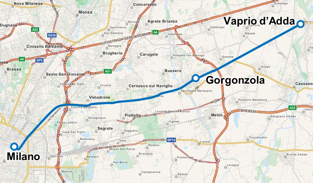 Tranvia Milano-Gorgonzola-Vaprio